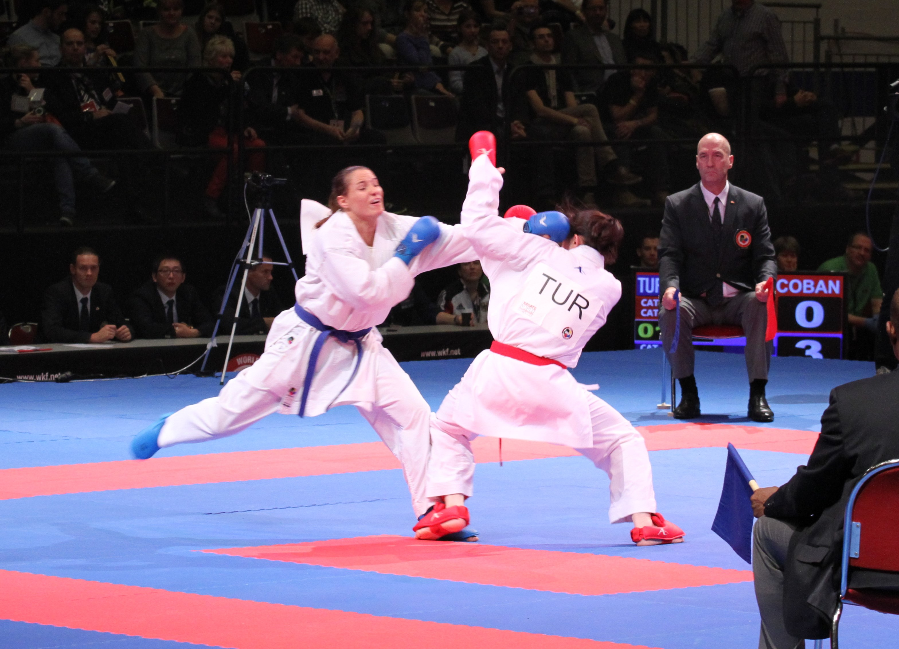 Alisa Buchinger, Karateka 3. Platz Karate Weltmeisterschaft 2014